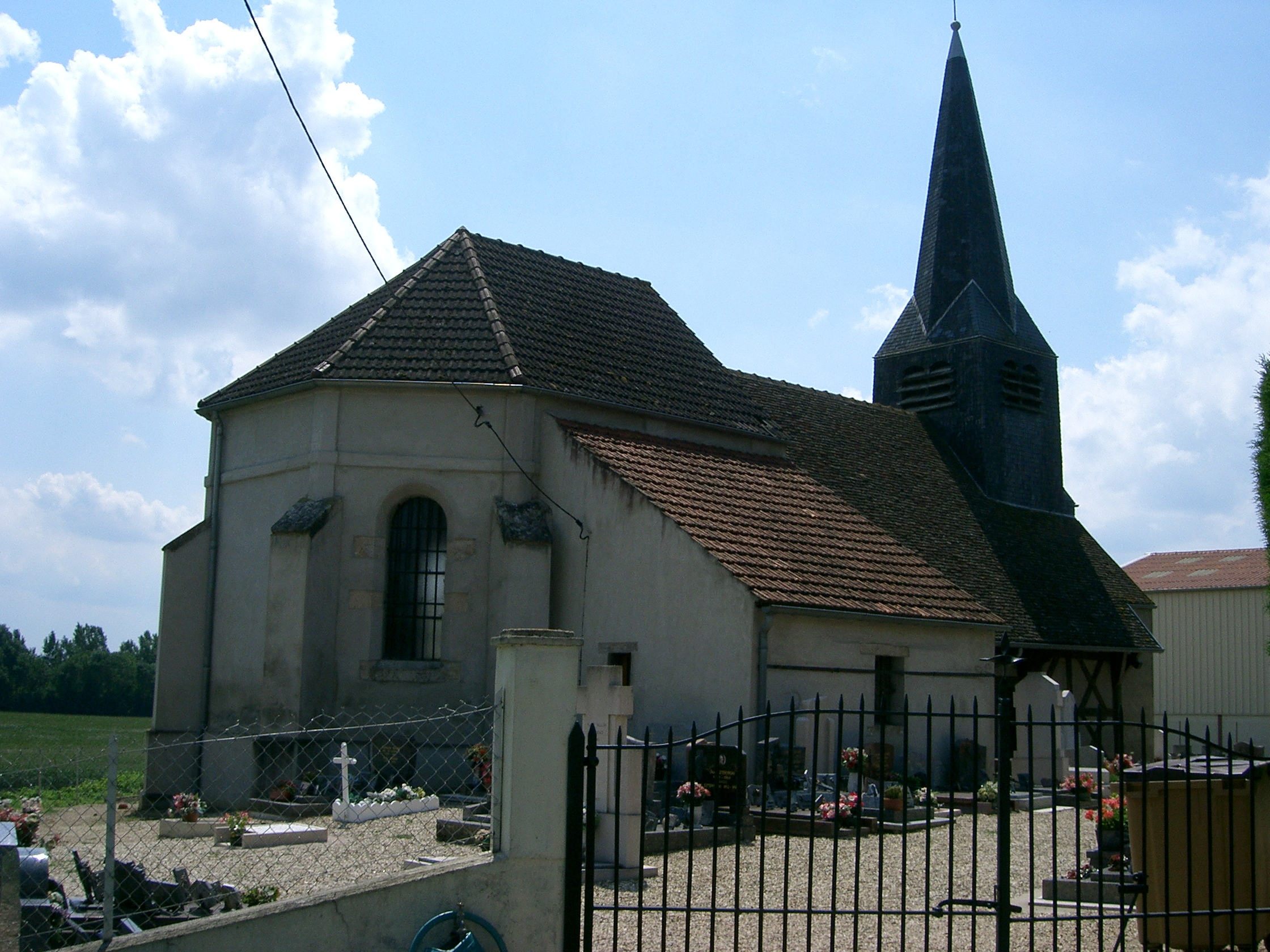 Mont-les-Seurre (Saône et Loire - France) - église